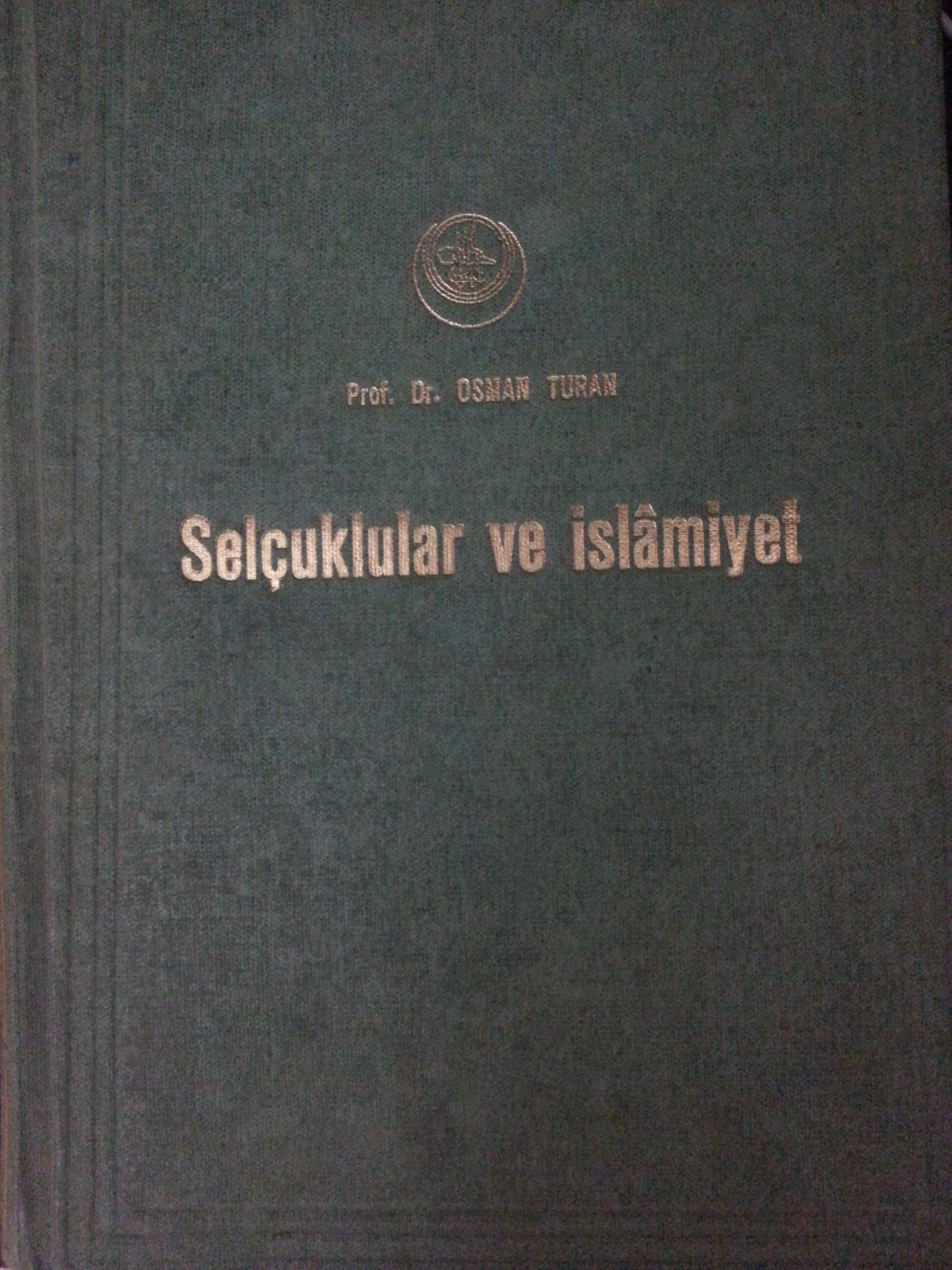 73 Basımının resmi